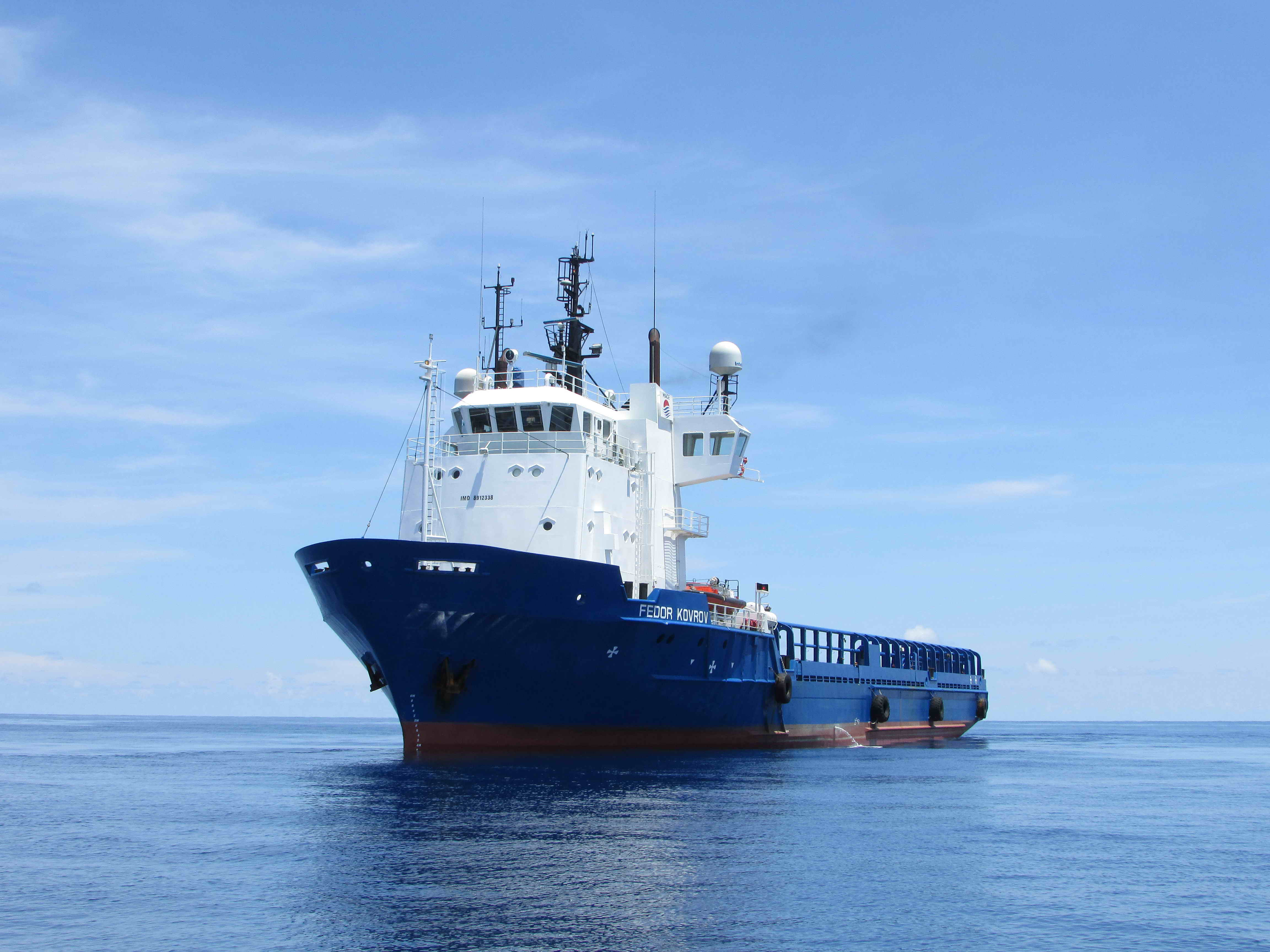 Флаг Российская Федерация Год постройки 1990 Место постройки Браттваг, Норвегия Класс регистра КМ ★[1] DYNPOS-1 Тип судна Исследовательское